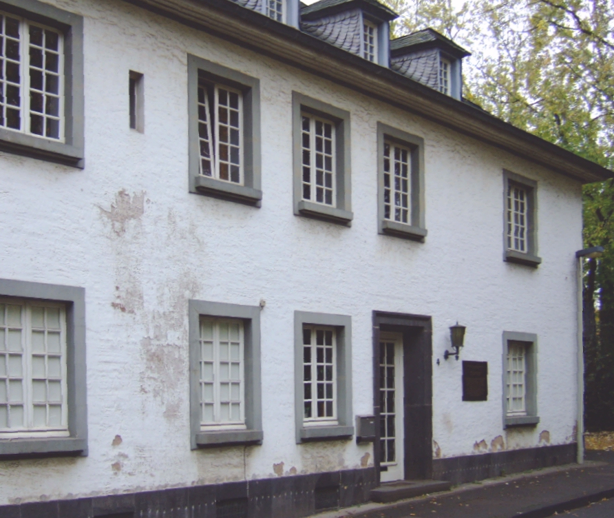 Geburtshaus von Peter Joseph Lenné in Bonn (Konviktstraße 4)